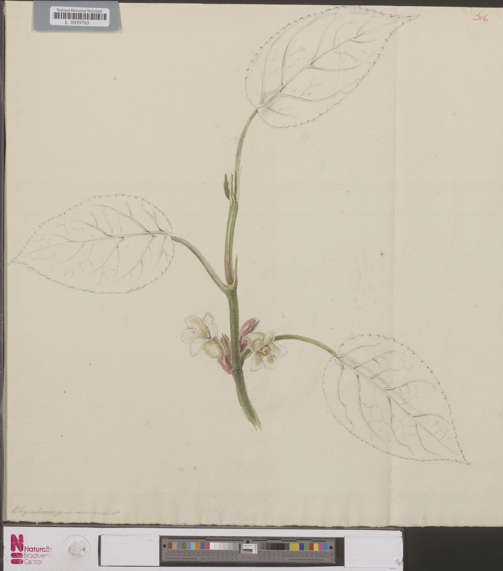 Cyrtandra nemorosus